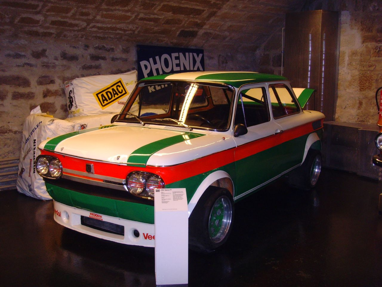 1286 ccm, 147 PS, 620 kg, 205 km/h. Von Siegfried Spiess weiterentwickelte Sportversion des NSU-TT. Deutsches Zweirad- und NSU-Museum Neckarsulm.